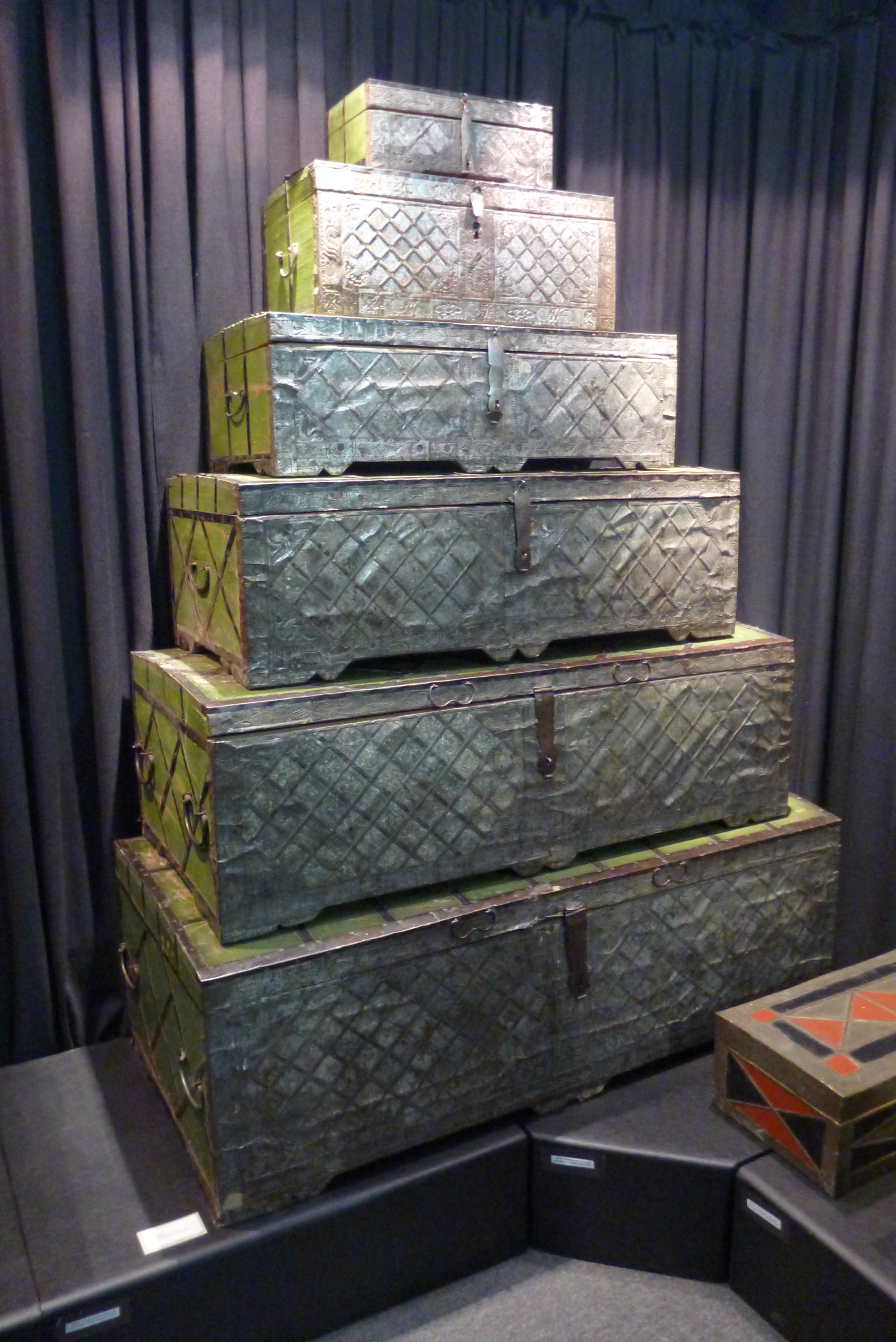 Пирамида сундуков в Нижнетагильском музее заповеднике 8 июня 2019 года